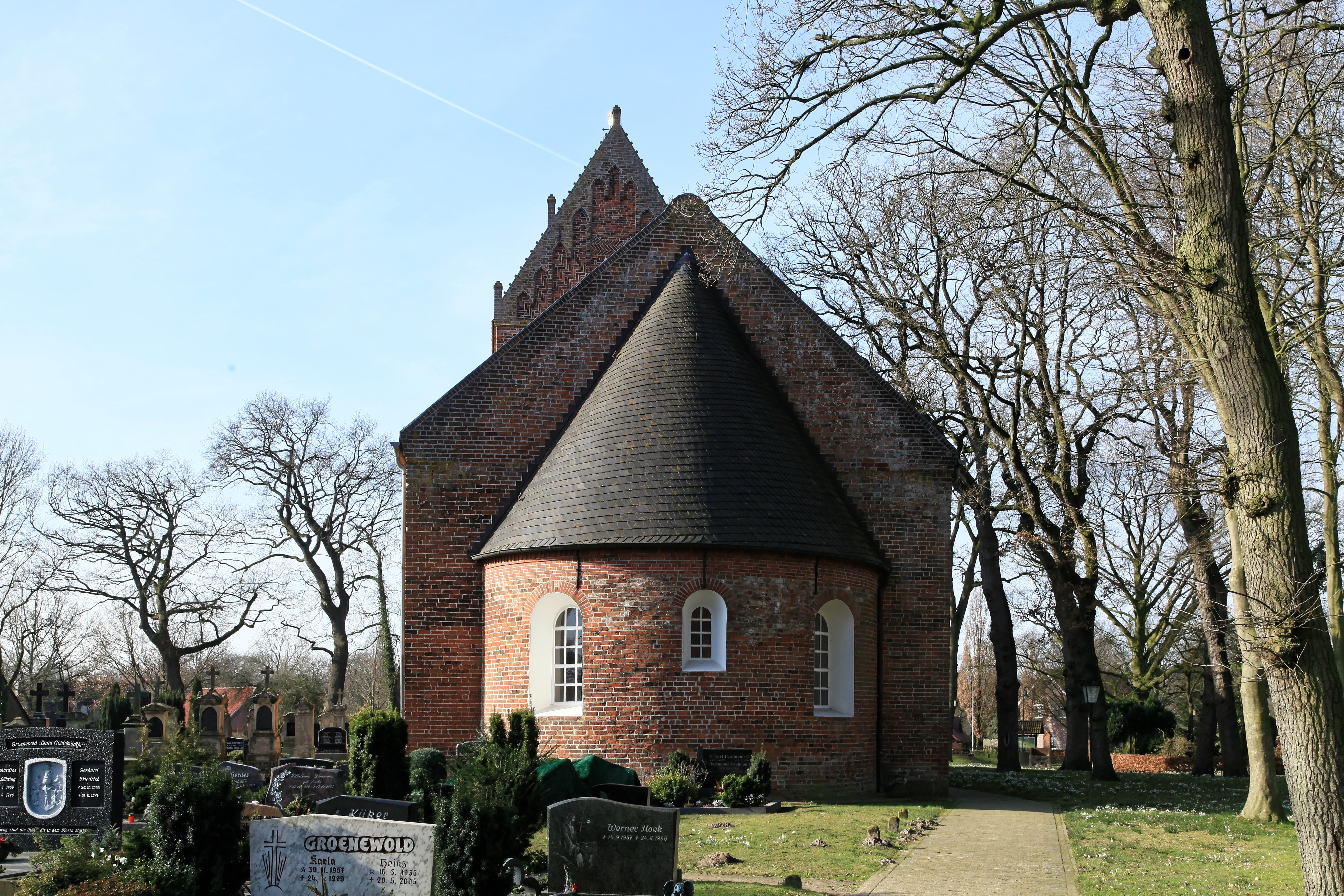 Friedhof Backemoor und Kirche St. Laurentius und St.Vincentius, Groot Karkweg in Rhauderfehn